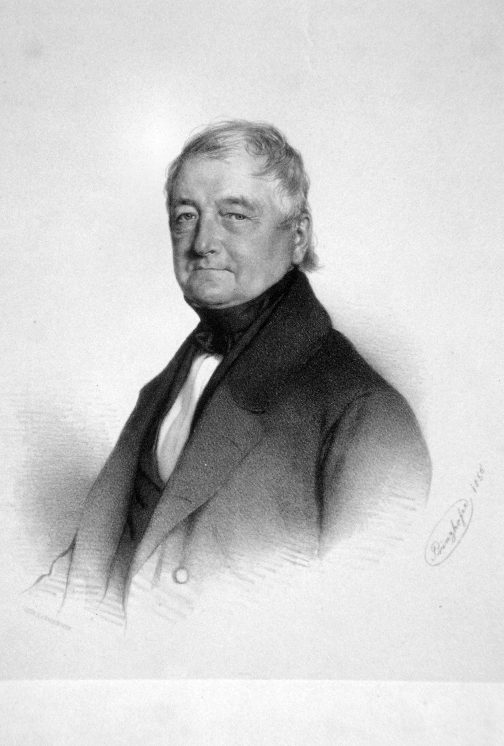 Franz Herman von Herrmansthal (1799-1875), k. k. Beamter, Dichter. Lithographie von August Prinzhofer, 1850